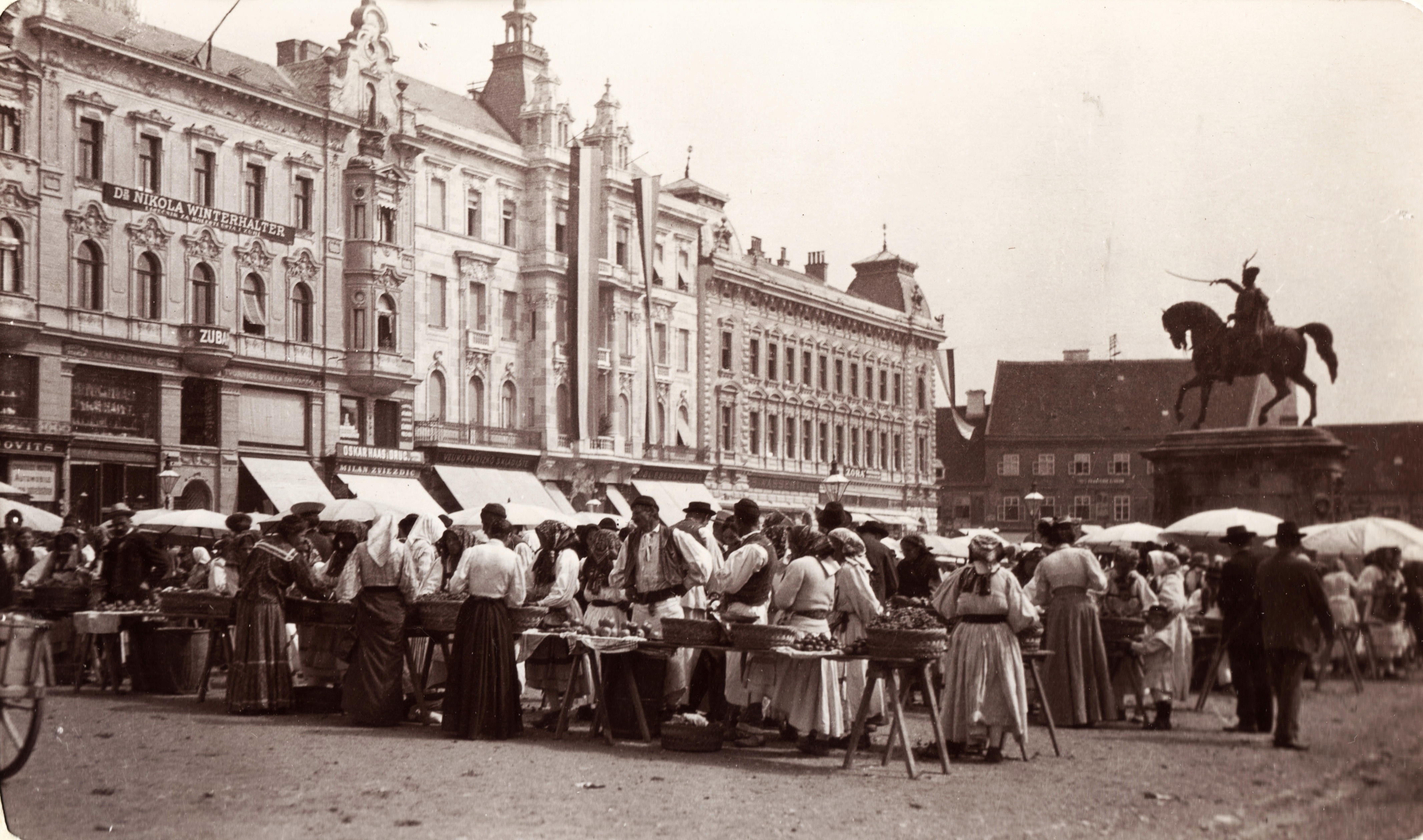 Jellasics bán tér (Trg bana Josipa Jelačića), Jellasics bán lovasszobra. Location: Croatia, Zagreb Tags: market, folk costume, street view, genre painting, horse sculpture, monument, Josip Jelačić-portrayal Title: Jellasics bán tér (Trg bana Josipa Jelačića), Jellasics bán lovasszobra.